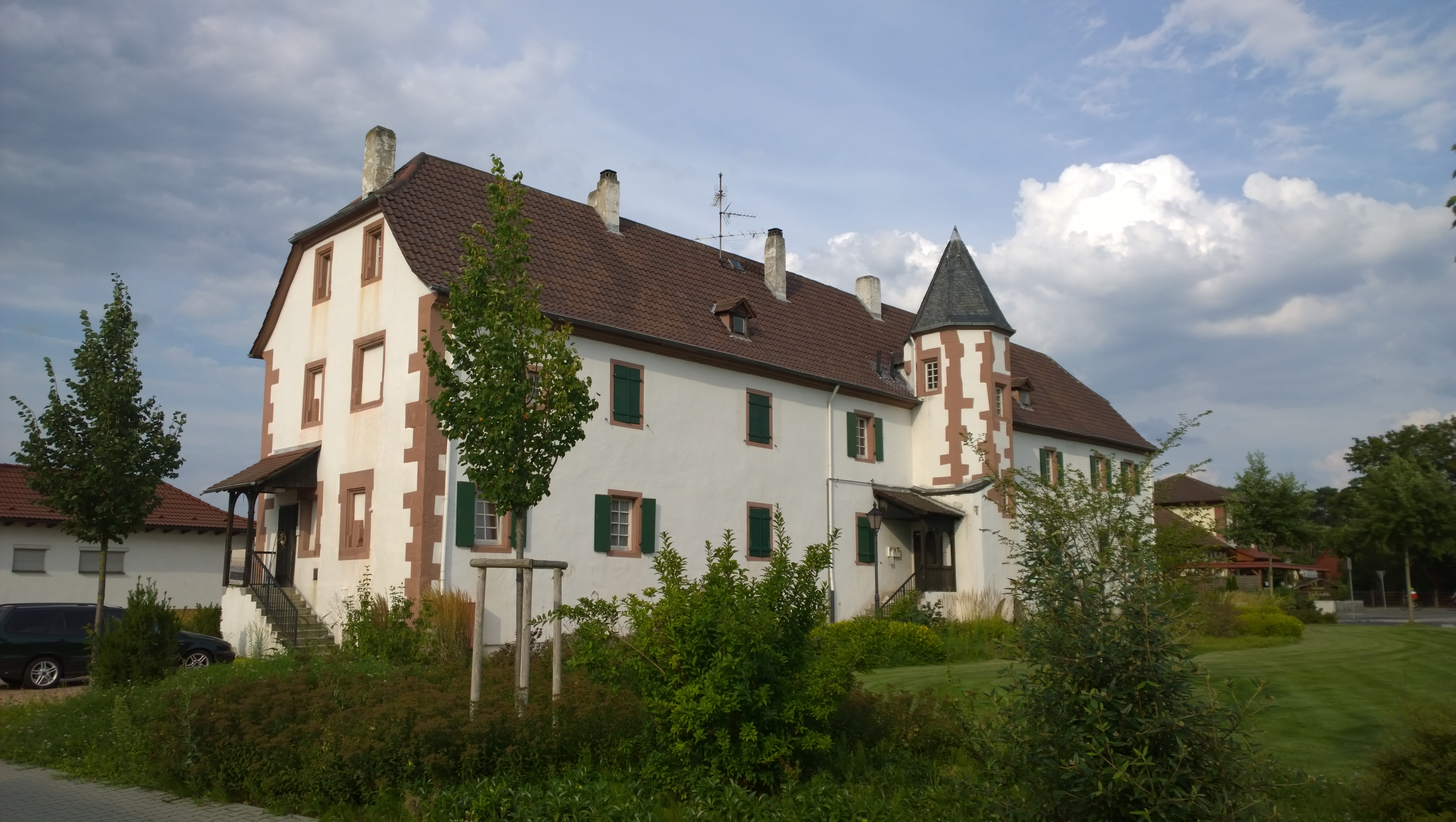 Wirtschafts- und Beamtenbau des ehemaligen Schloss Neuschloss (Friedrichsburg)